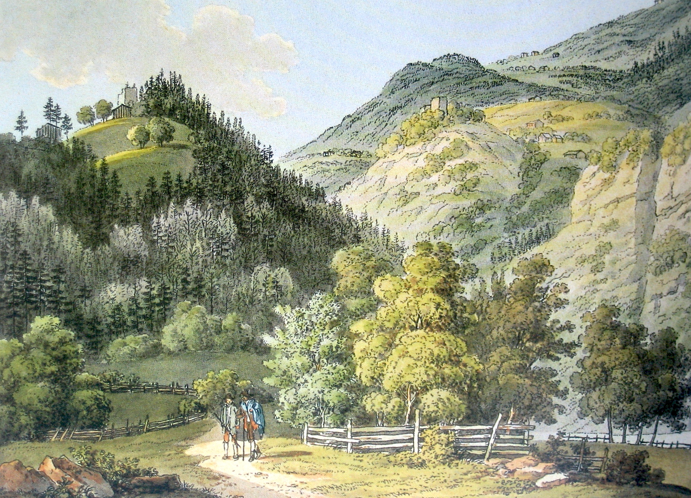 Burgen Strahlegg und Castels im Hintergrund. Radierung von Johann Balthasar Bullinger (1713 - 1793) und Heinrich Füssli (1755 - 1829)